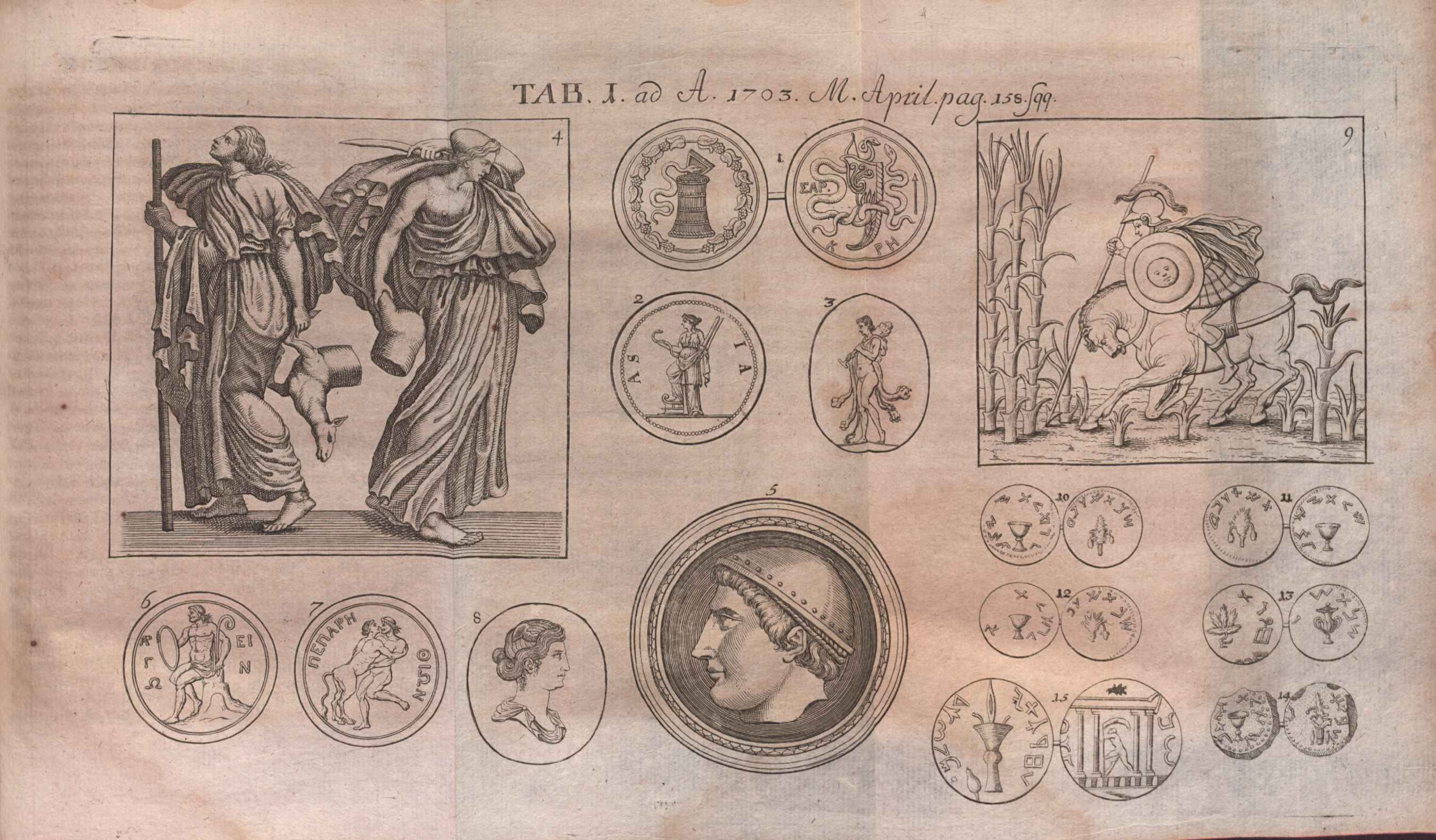 Illustration